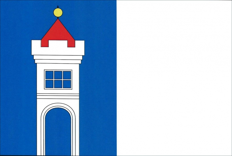 vlajka, Katovice, okres Strakonice